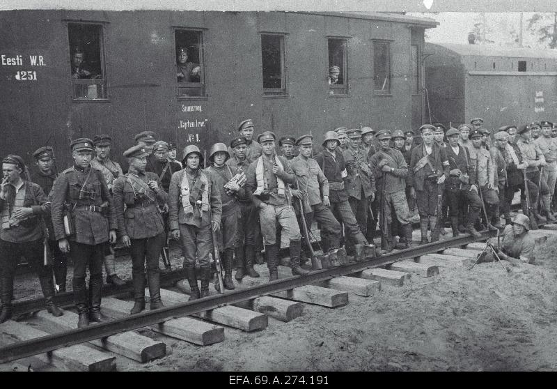 Laiarööpmelise soomusrongi "Kapten Irv" dessantrood 1919. aasta juunis. Vasakult kolmas rongi dessantpataljoni ülem alamkapten Hans Raudsepp.